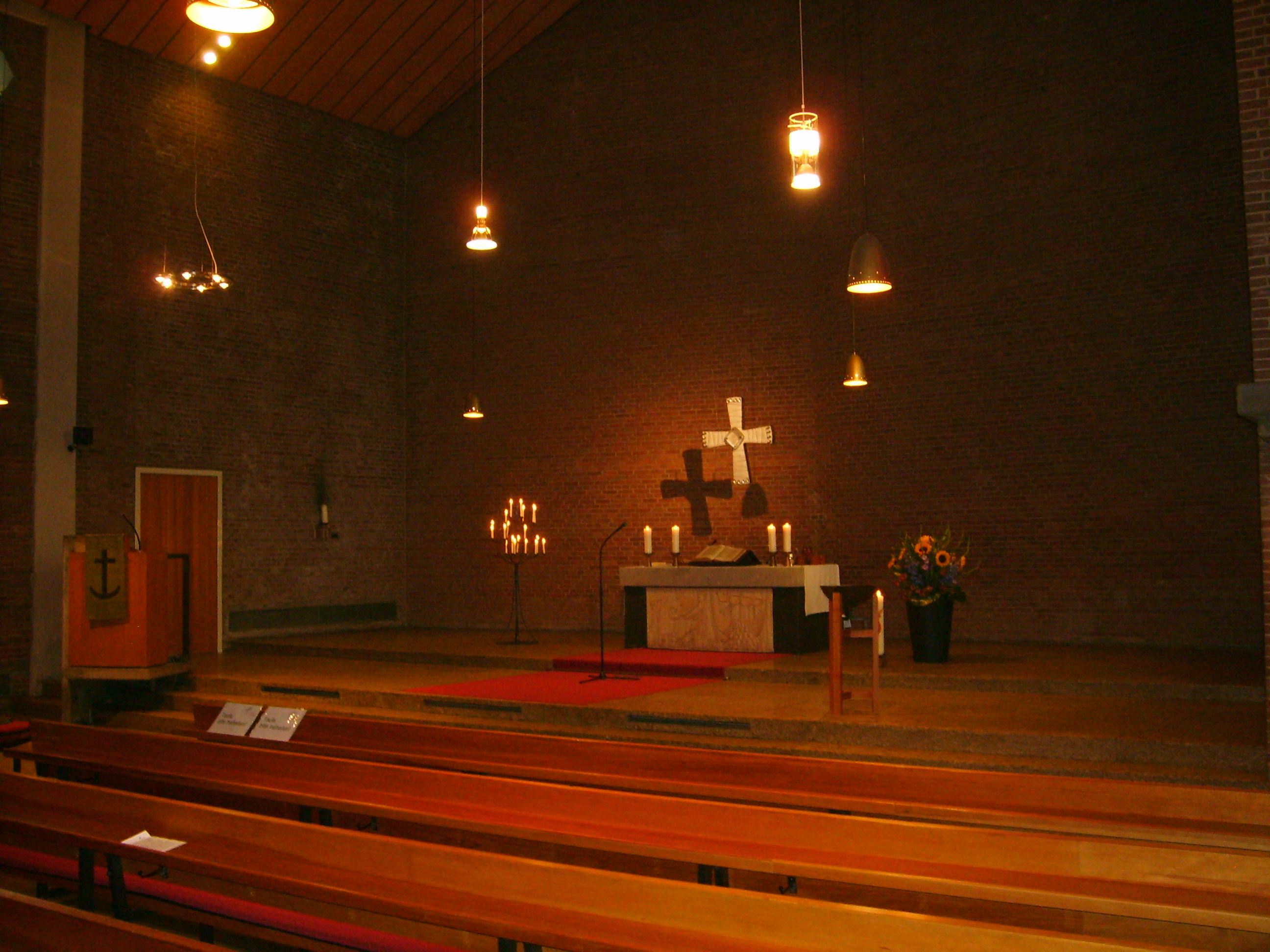 Innenraum der Johanneskirche in Köln, Stirnseite mit Altar und Triumphkreuz